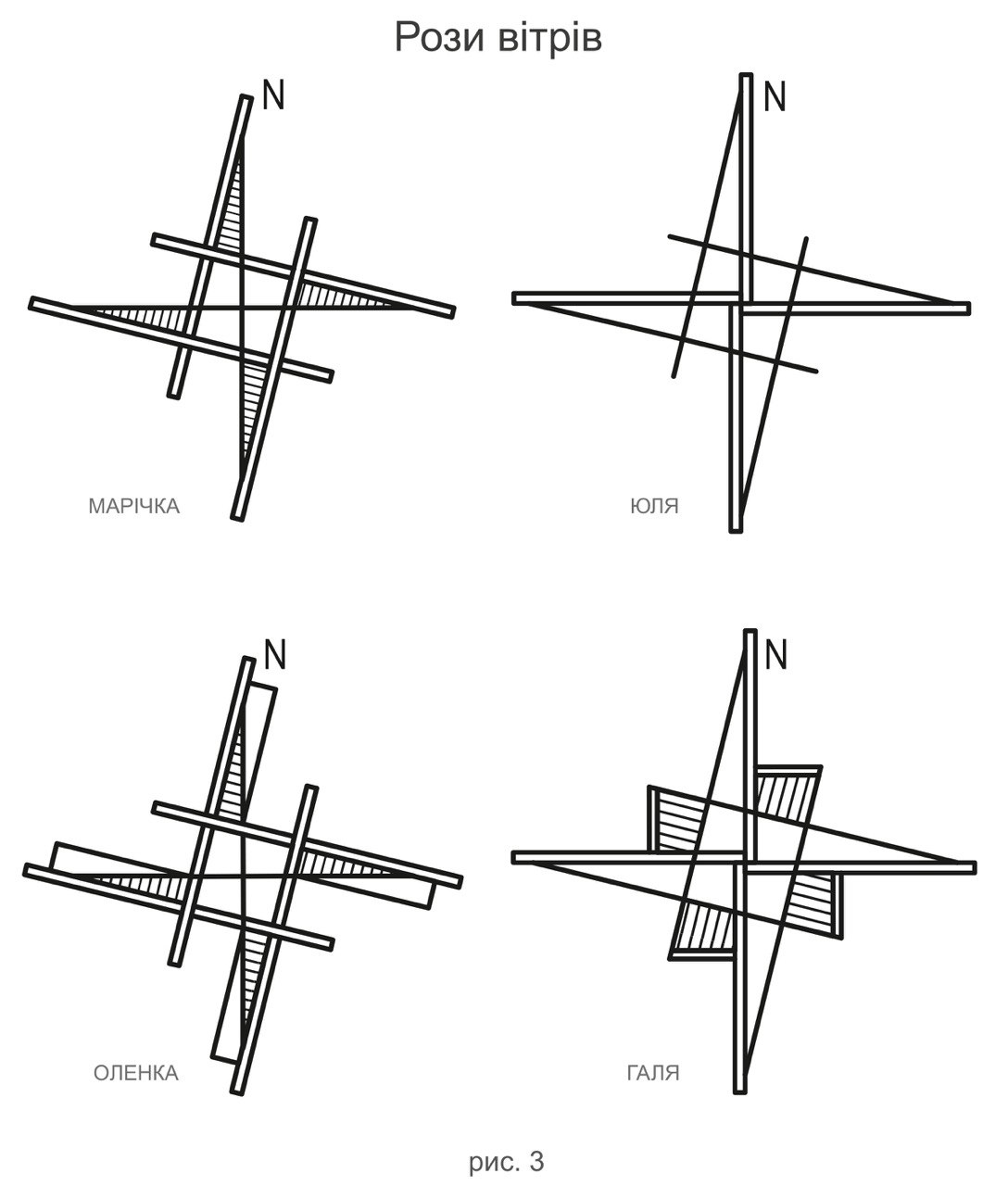 Роза Вітрів - географічне позначення сторін горизонту та азимутів, а для Бунтарок - символ пошуків пригод.